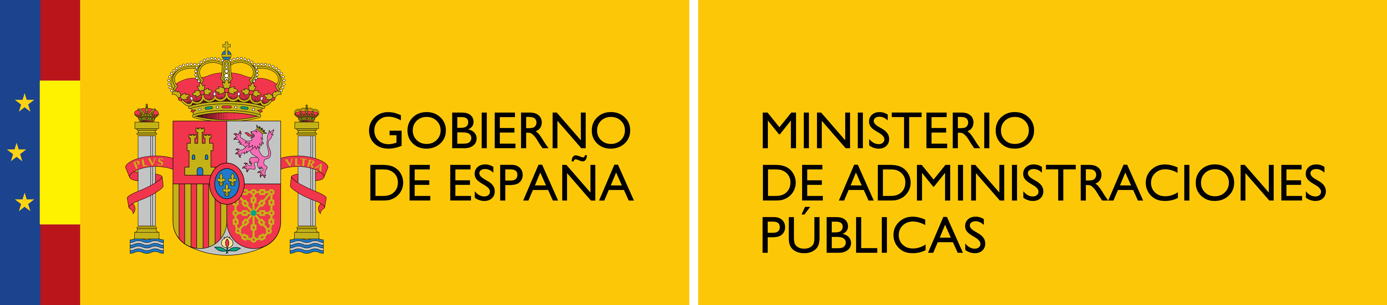 Logotipo del Ministerio de Administraciones Públicas